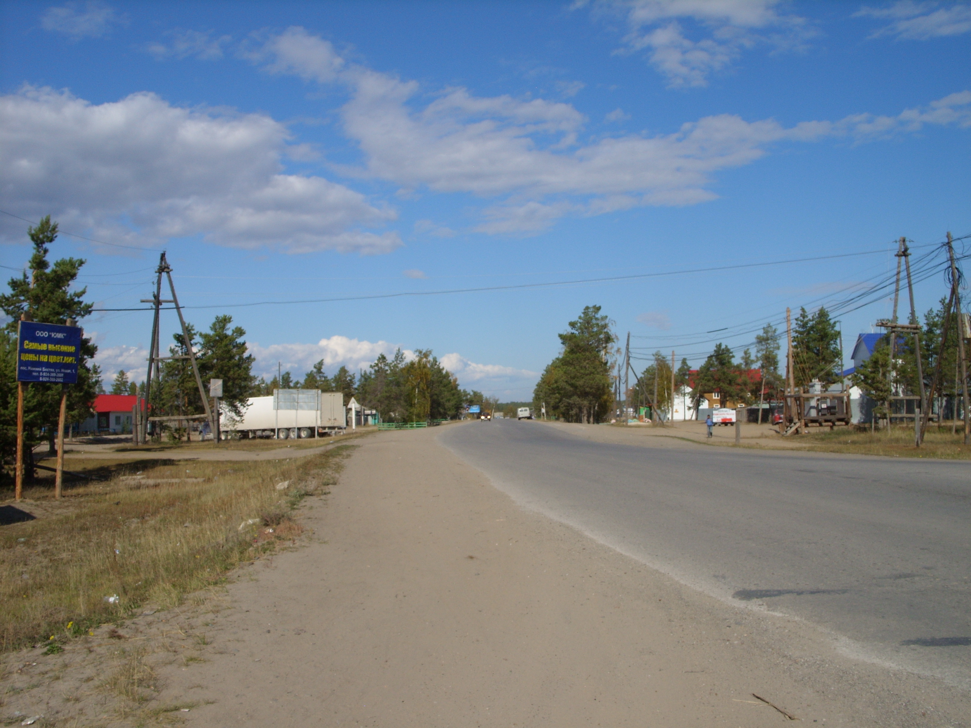 Центр поселка Нижний Бестях